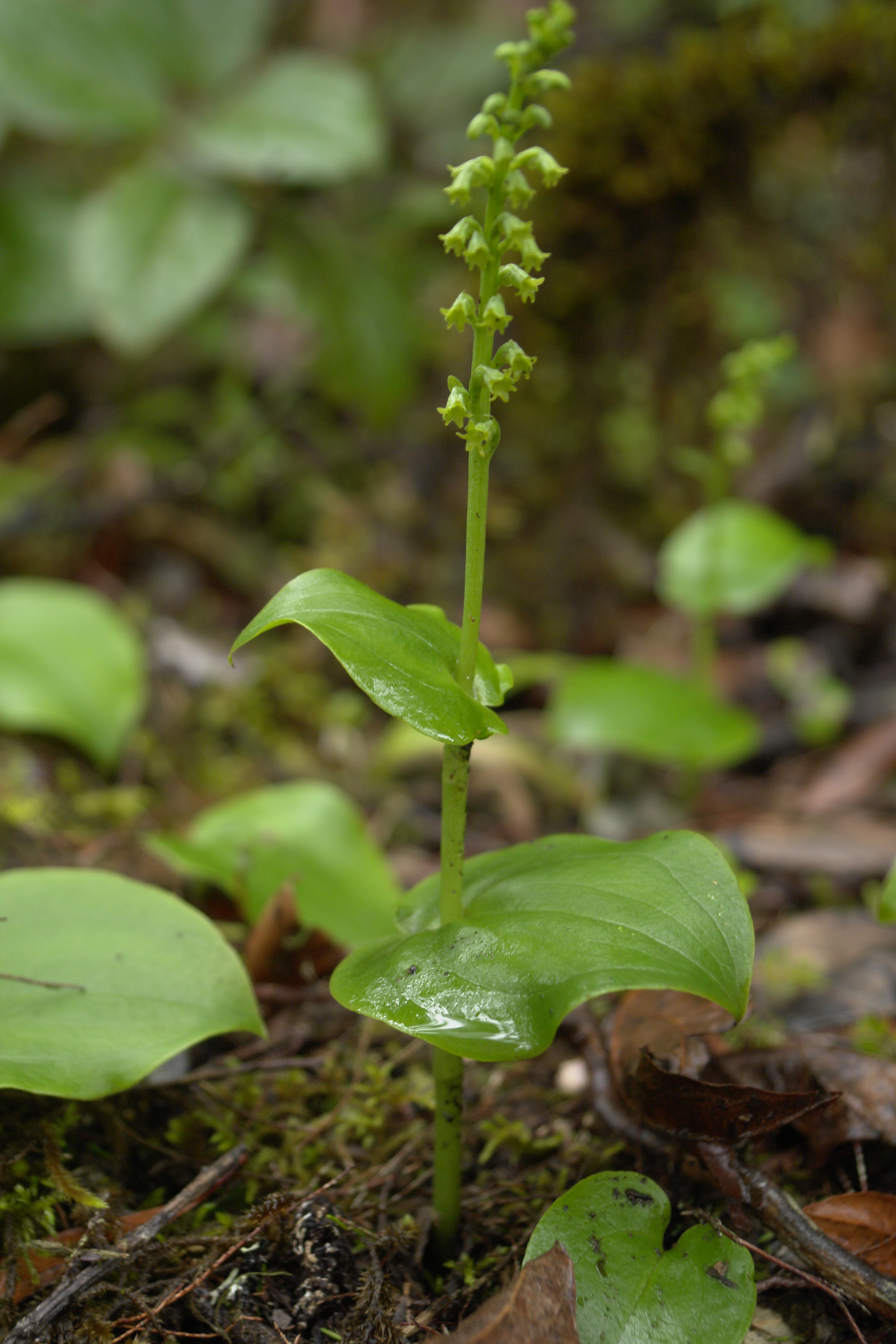 Gennaria diphylla, december 2006, Laurisilva forest in "La Gomera" Island